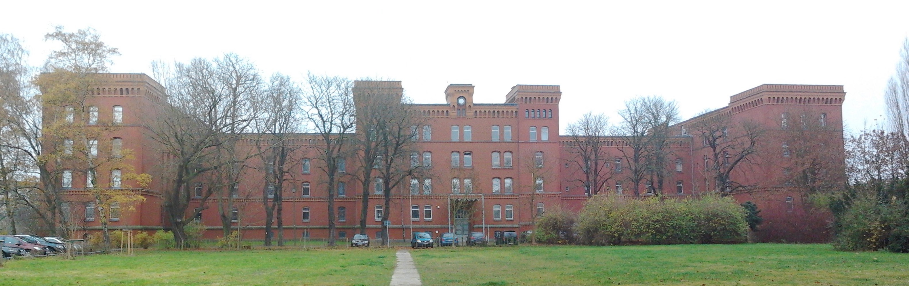 Greifswald, Landesarchiv, ehemals Kaserne des Ausbildungsbataillons des 5. Infanterie-Regiments, später Sitz der Verwaltung des Kreises Greifswald